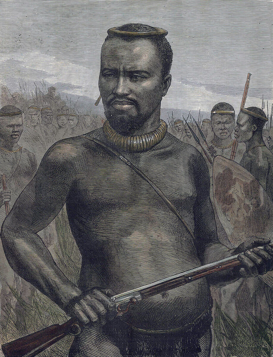 Le chef Dabulamanzi, qui commande les Zoulous à Rorke's Drift